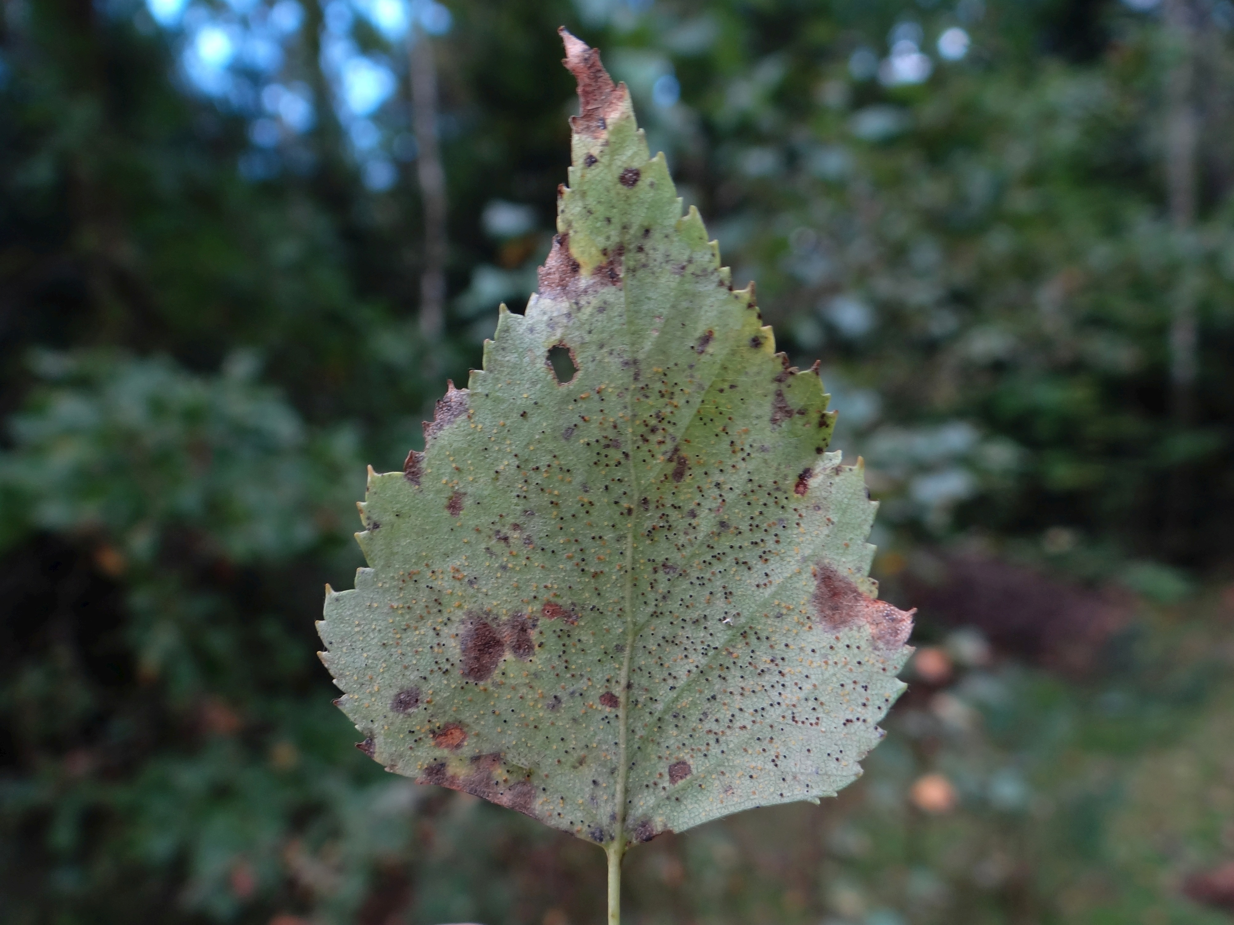 Melampsora populnea. Uredninum and telium on leaf Populus tremula